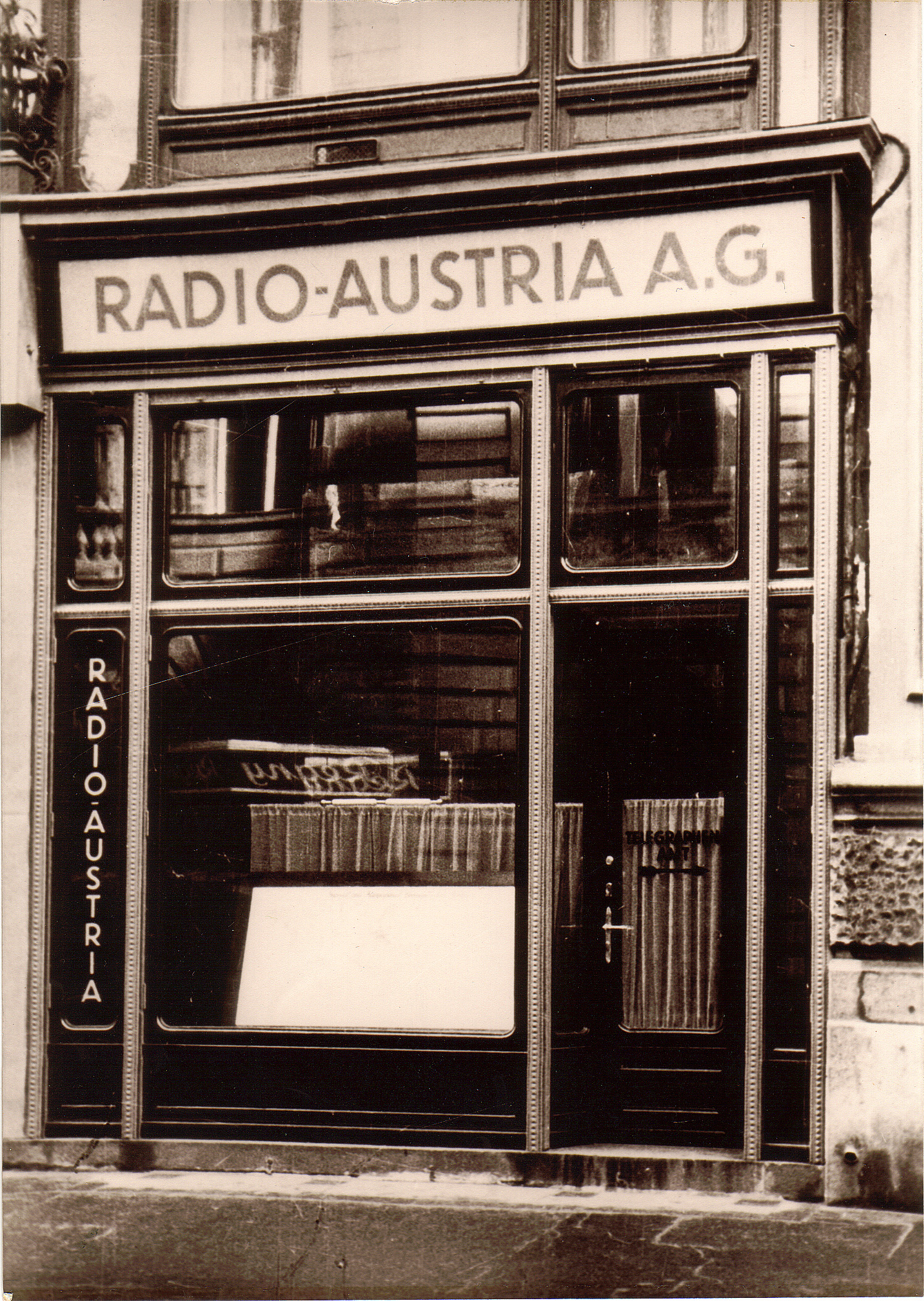 Radio-Austria AG Telegrammannahme 1929